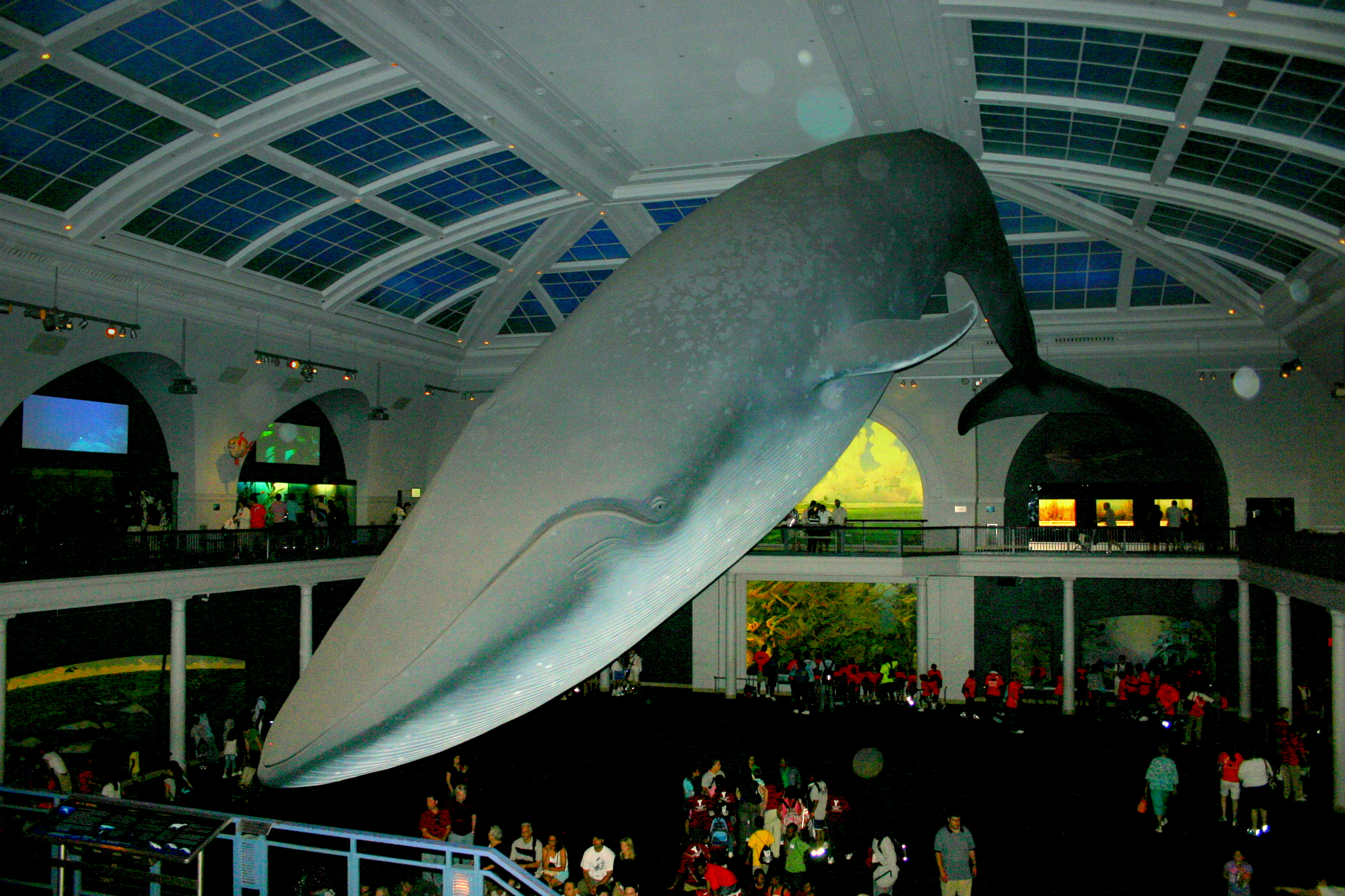 Model of a blue whale in the Museum of Natural History, New York 2010